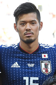 Япония проиграла Польше, но вышла в плей-офф